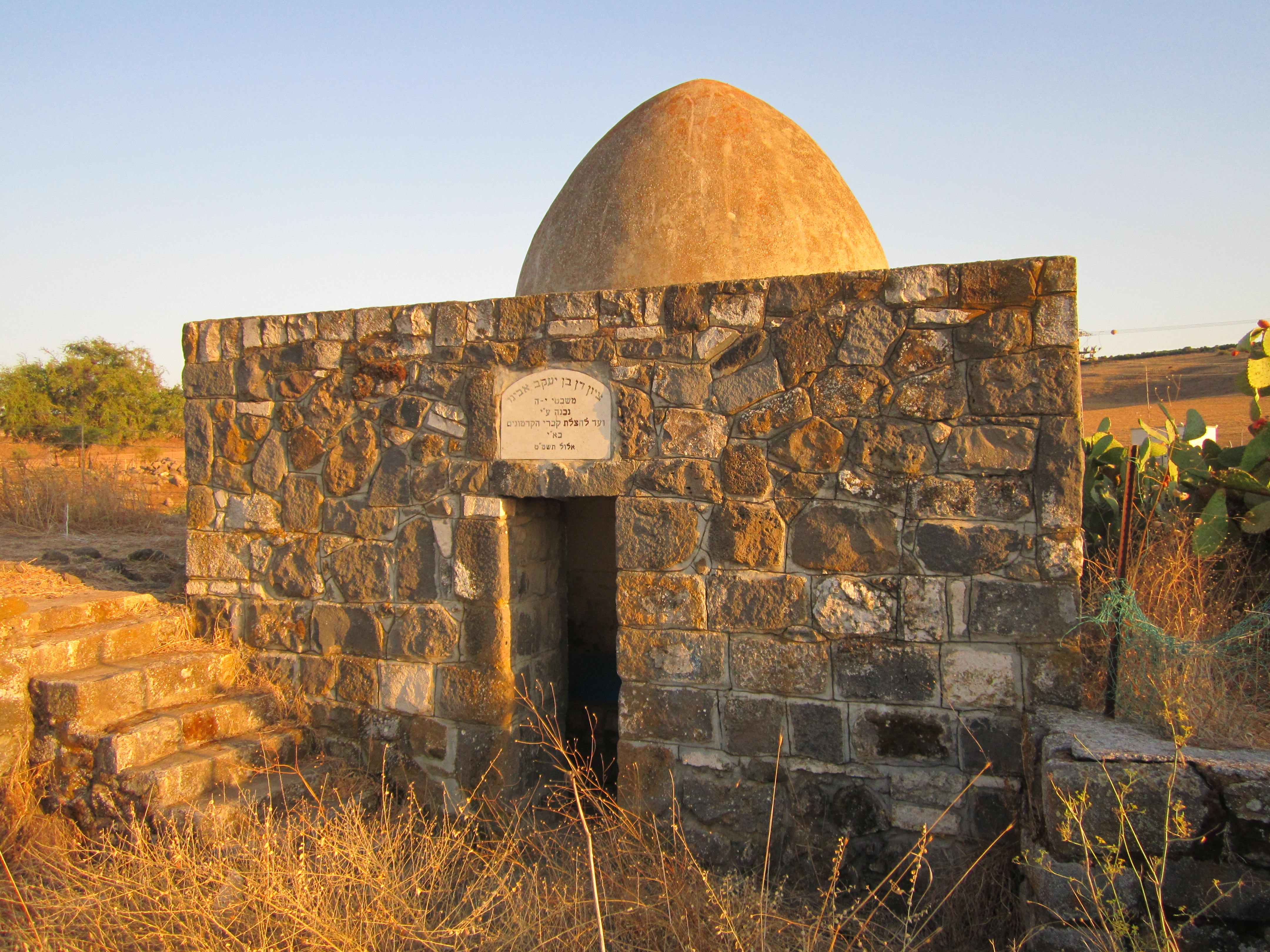 קבר דן בן יעקב מזרחית להר תבור לפי דעת ספר כפתור ופרח